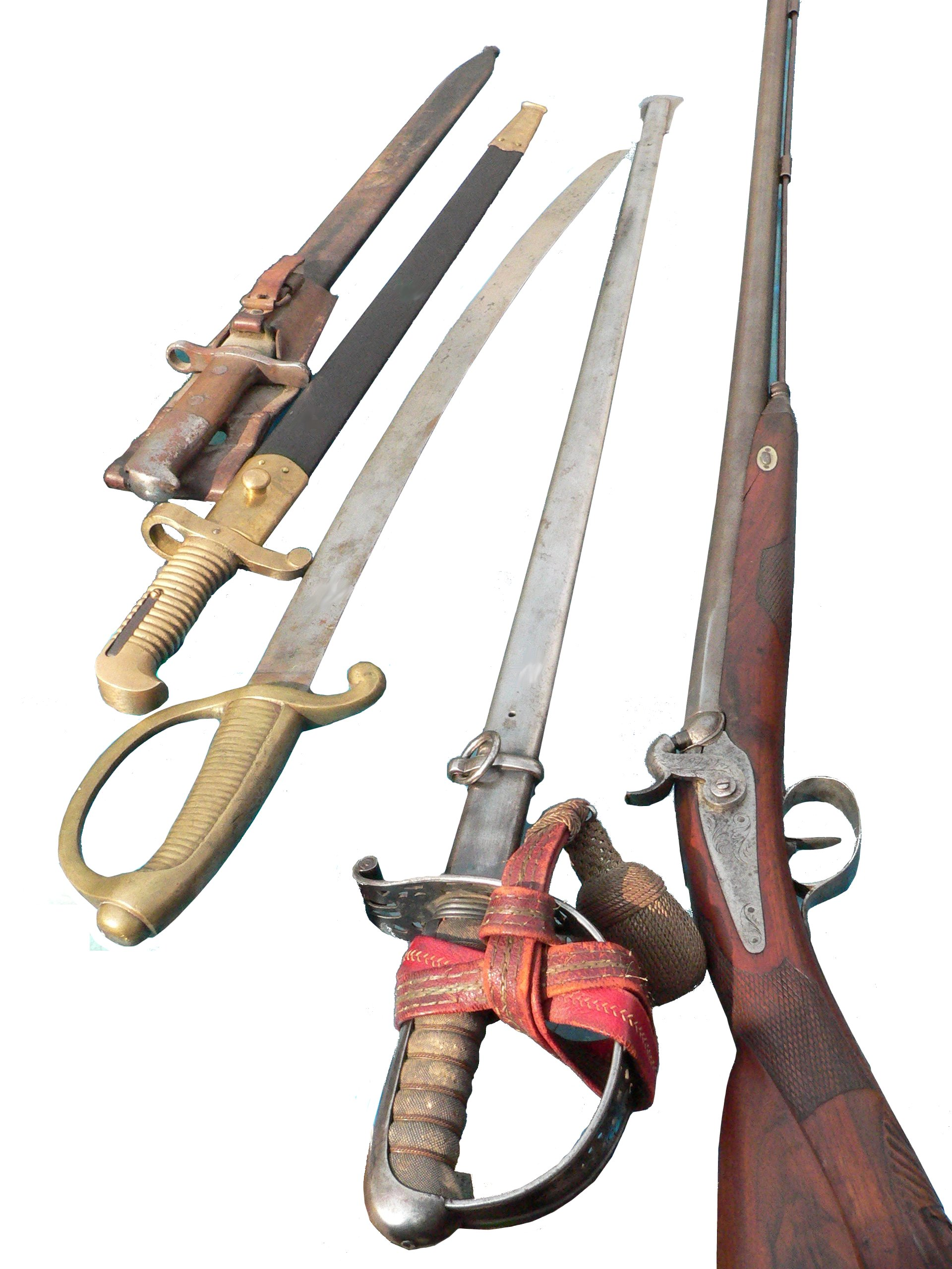 DerIiZ